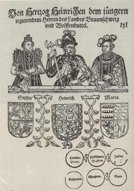 Zofia Jagiellonka, Henryk II Młodszy, Maria Wirtemberska